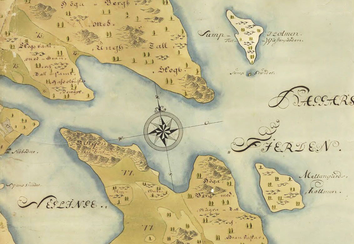 Del av Erstaviks ägor visande del av Neglingeön med Mellangårdsholmen och Sumpholmen samt Sumpgrundet, uppmätta och nedtecknade år 1721, 1722 och 1723